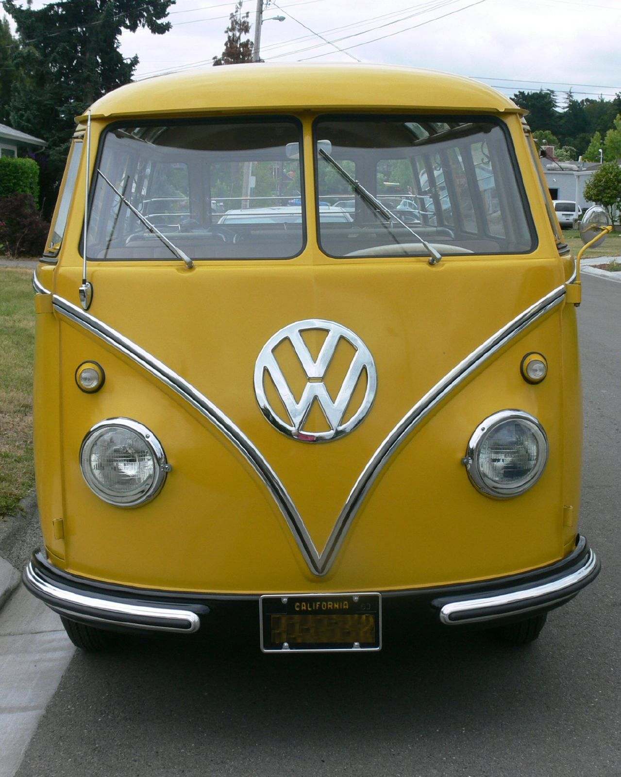 1956 Volkswagen T1 Deluxe yellow